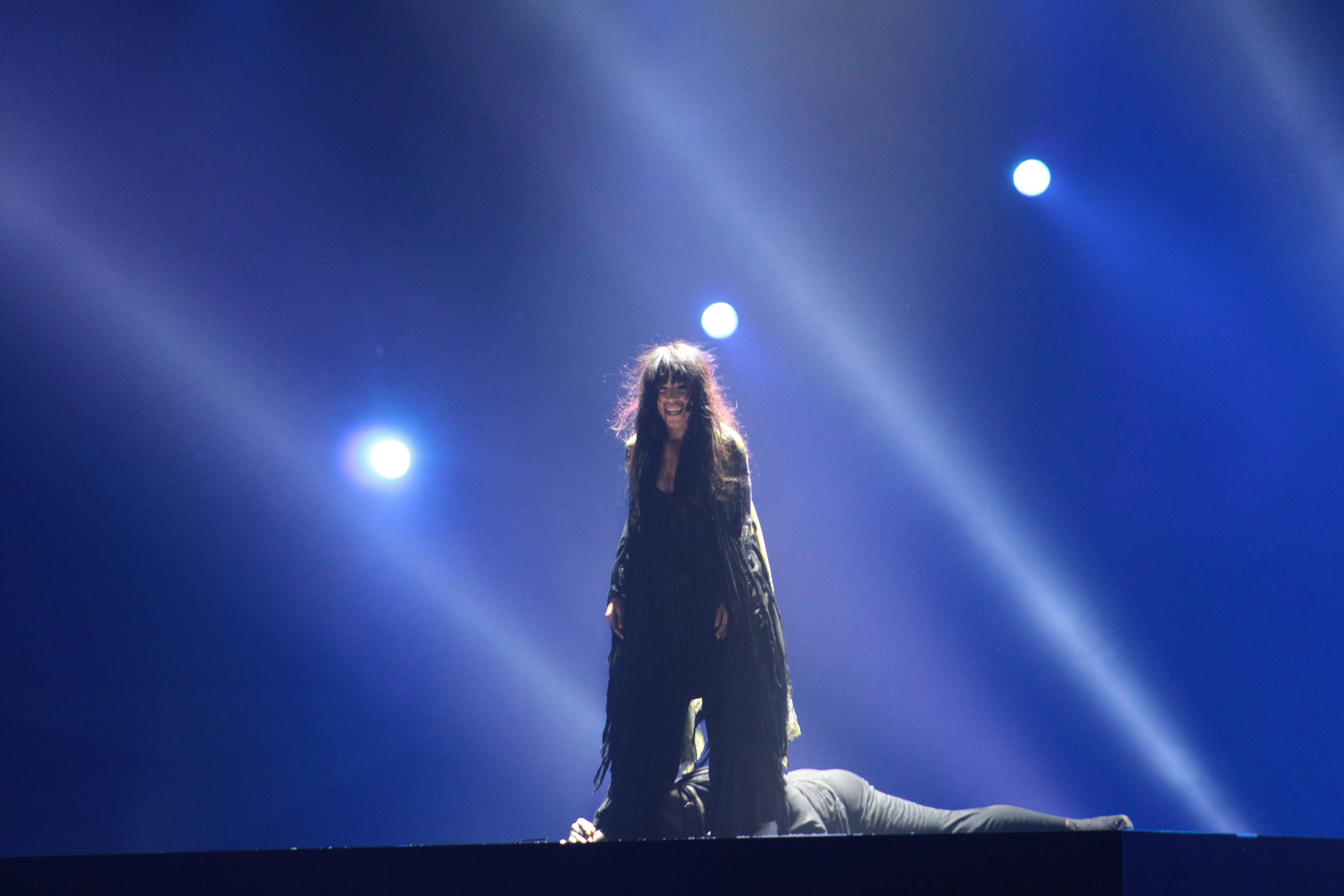 Победительница Евровидения 2012 Лорин